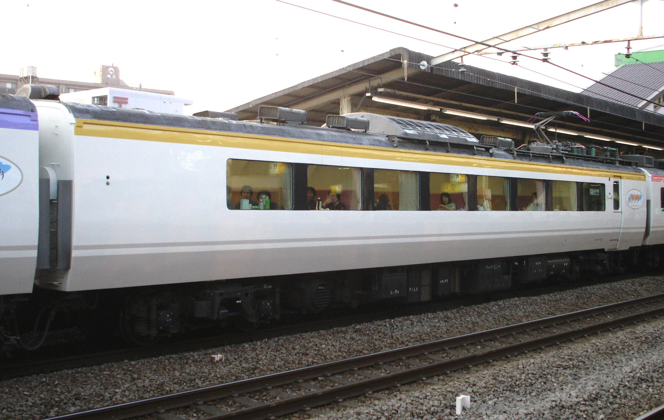 JR東日本 485系「彩（いろどり）」